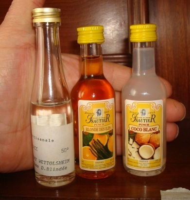 Topette de liqueur de 3 centilitres